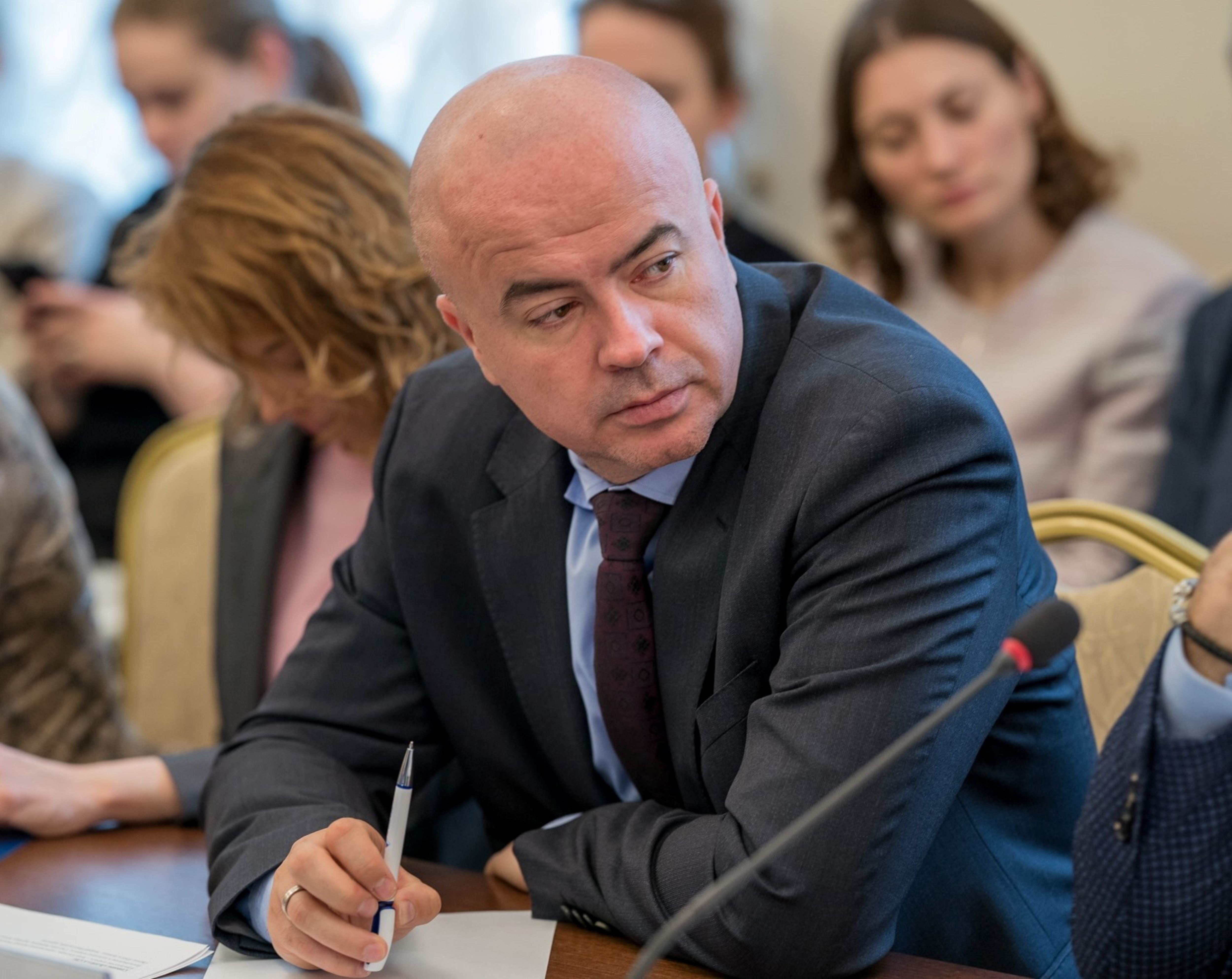 Дунаев Андрей Геннадьевич, фото с Конференции «Развитие креативных индустрий в России», 27 сентября 2019 года.